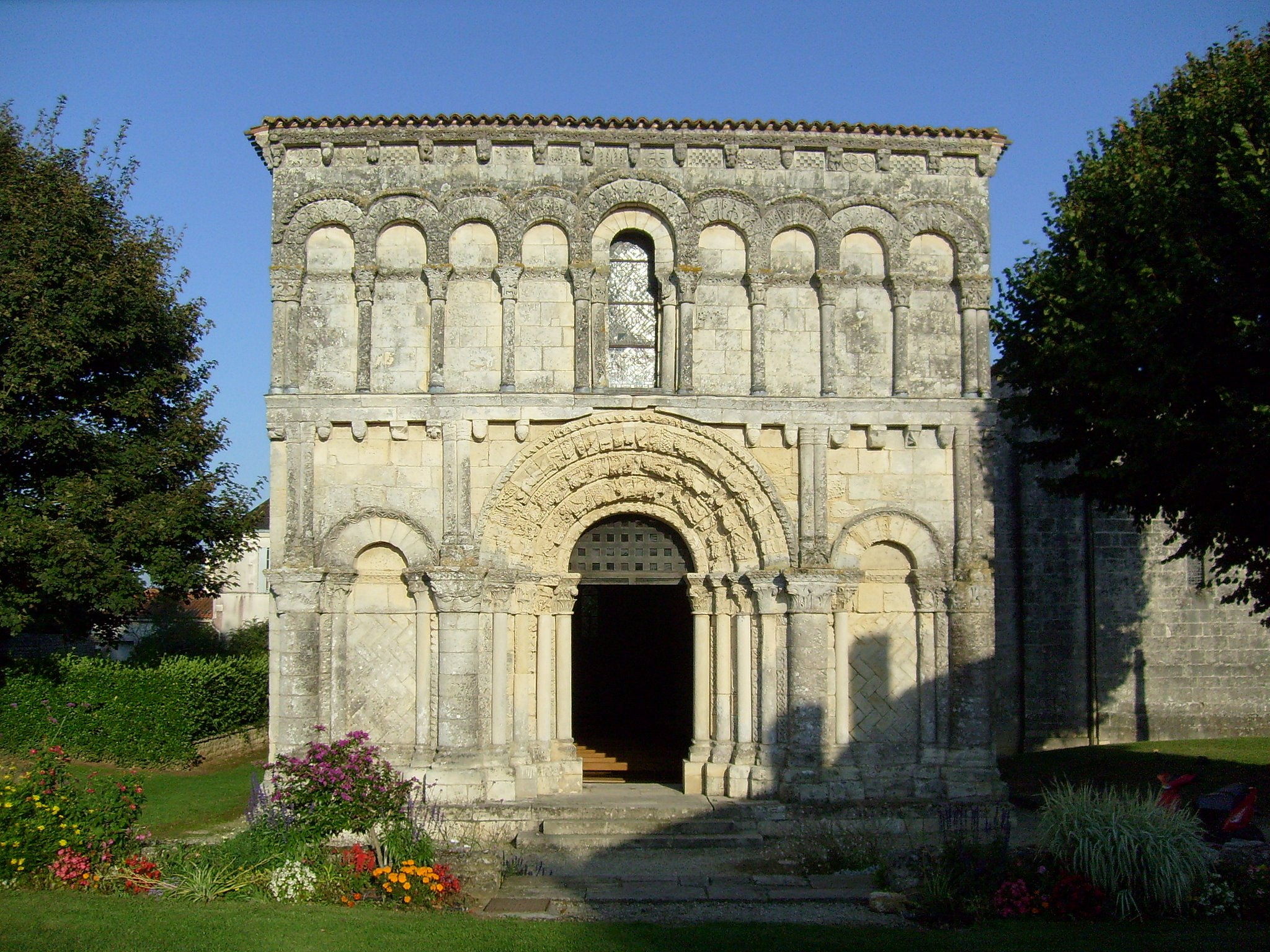 Eglise d'Echillais (17), France